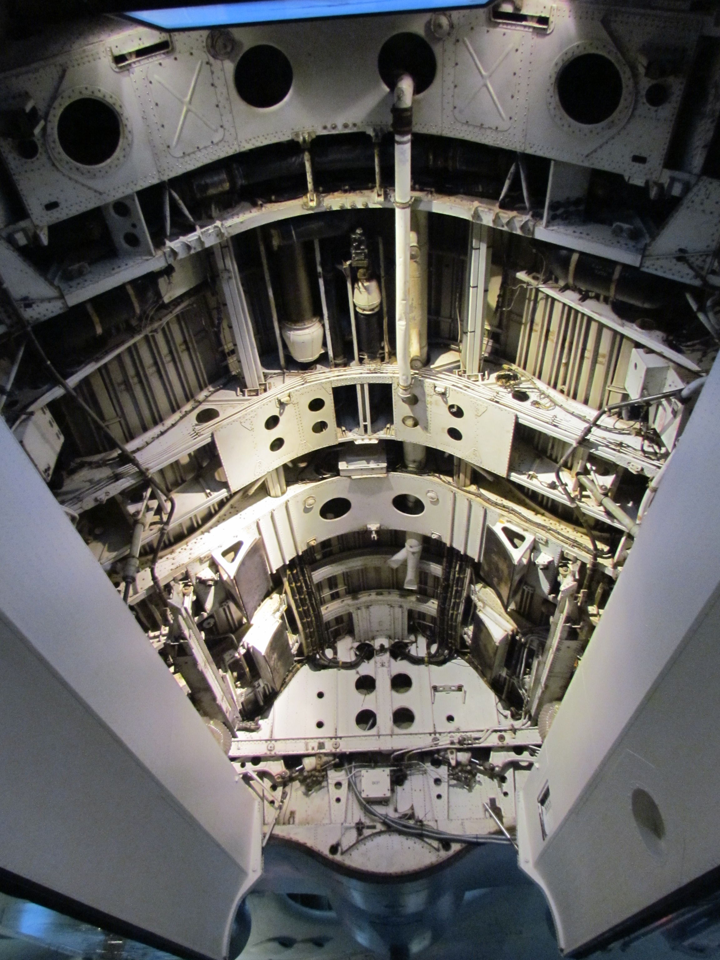 Vulcan Bomb Bay